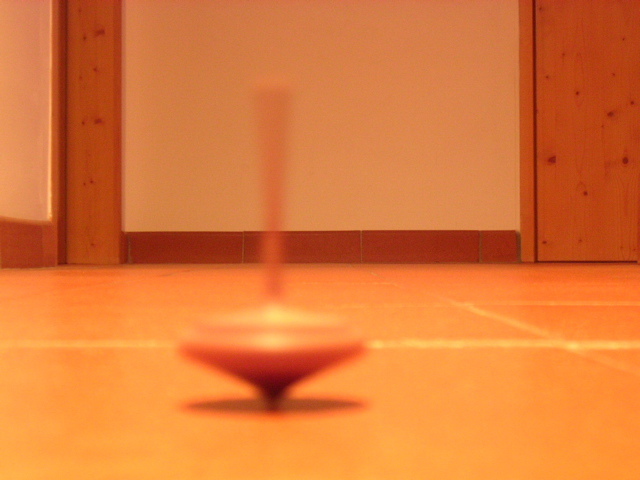 Kreisel in Bewegung und selbst fotografiert am 25. 12. 2003